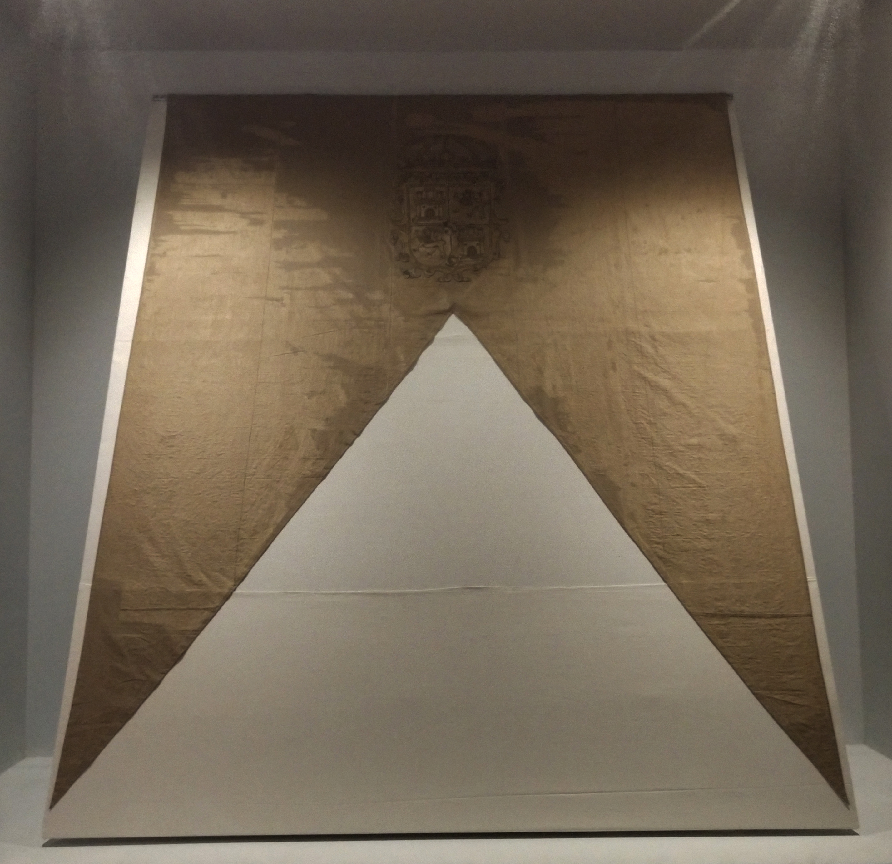 Autor desconocido. Museo Nacional de Historia. Exhibido en el Museo de la Ciudad de México.